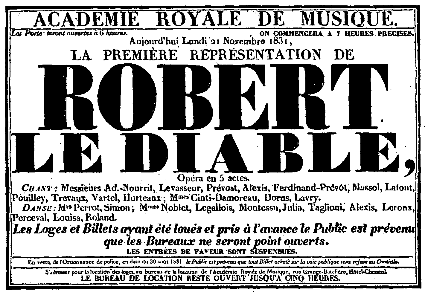 Affiche de la première représentation de Robert le Diable par Giacomo Meyerbeer le 21 novembre 1831 à l'Académie royale de Musique